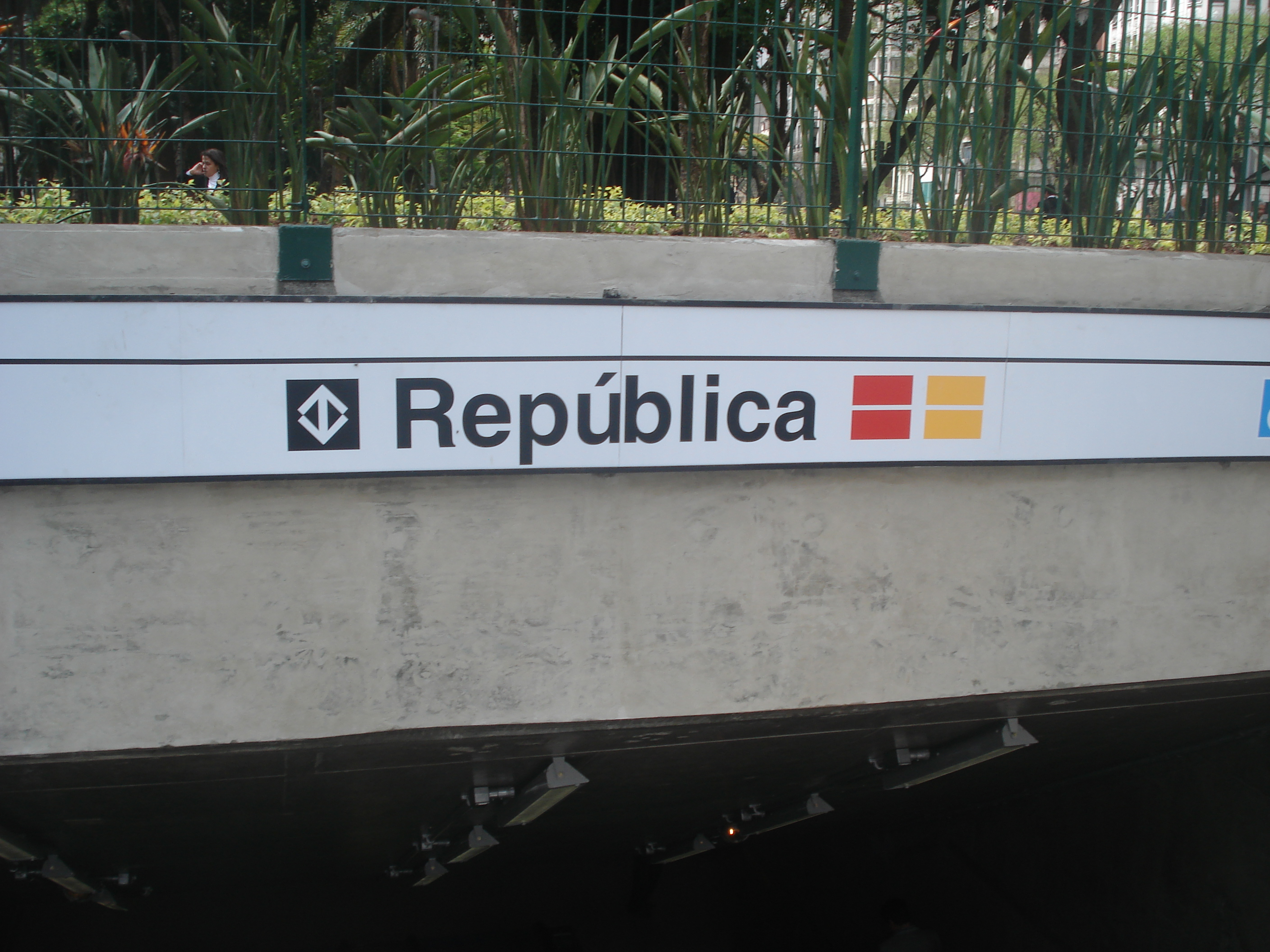 Entrada da Estação República.